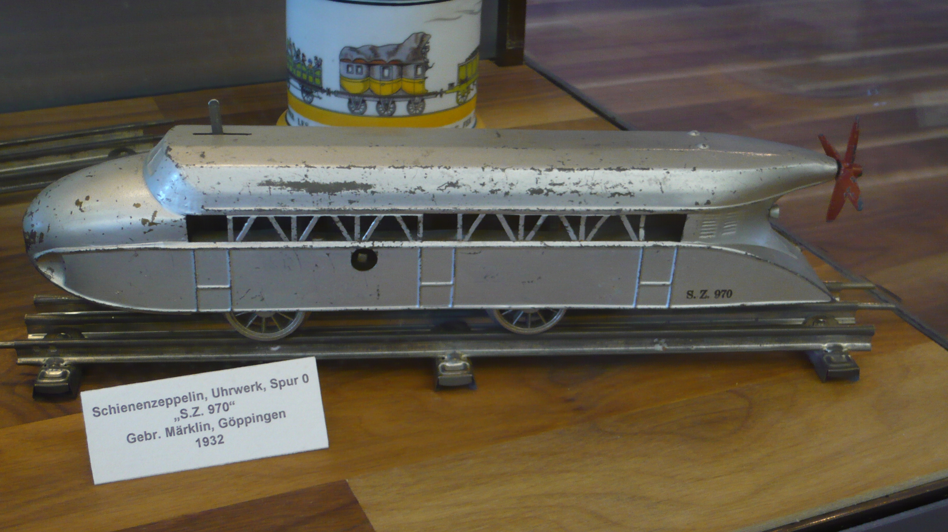 Model des Schienenzeppelin "S.Z. 970" in Spur 0 mit Uhrwerk von Märklin aus dem Jahr 1932 aufgenommen im Zürcher Spielzeugmuseum Native nameZürcher SpielzeugmuseumLocationZürich, SwitzerlandCoordinates47° 22′ 23″ N, 8° 32′ 23″ E Established1956WebsiteZürcher SpielzeugmuseumAuthority control : Q248517